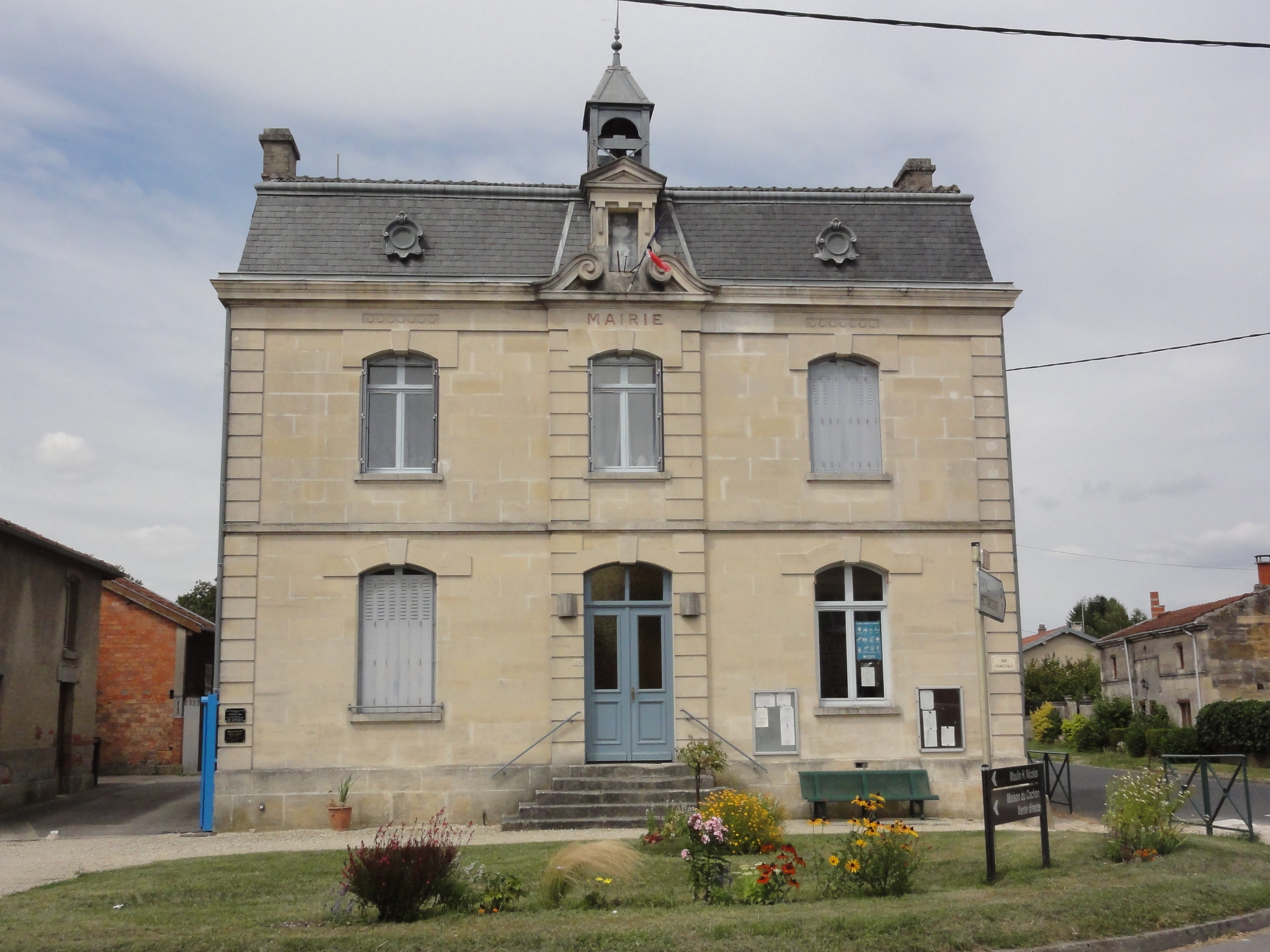 Rancourt-sur-Ornain (Meuse) mairie